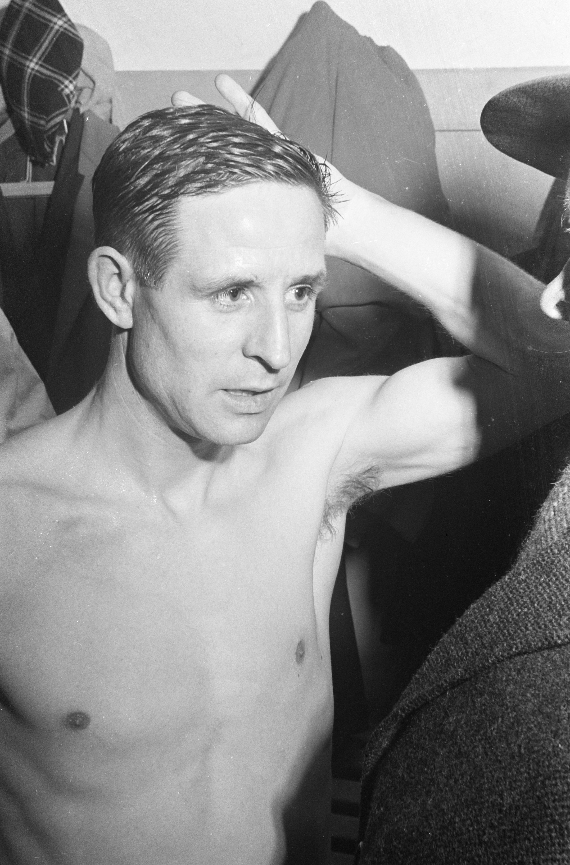 Raymond Kopa in Rotterdam voor de wedstrijd tussen Stade Reims en Feyenoord in 1963.